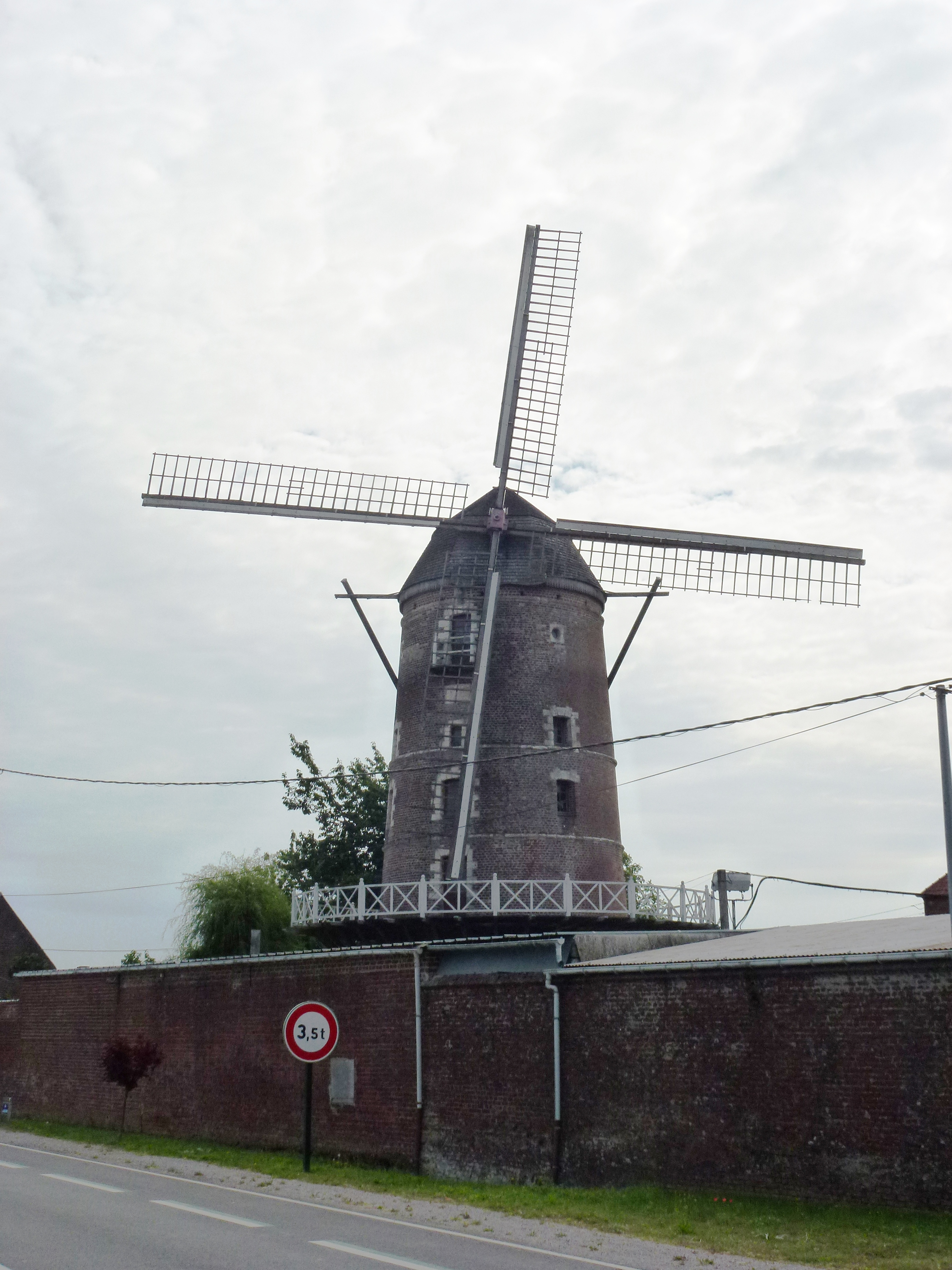 Saint-Martin-au-Laërt (Pas-de-Calais, Fr) moulin PA62000046 .